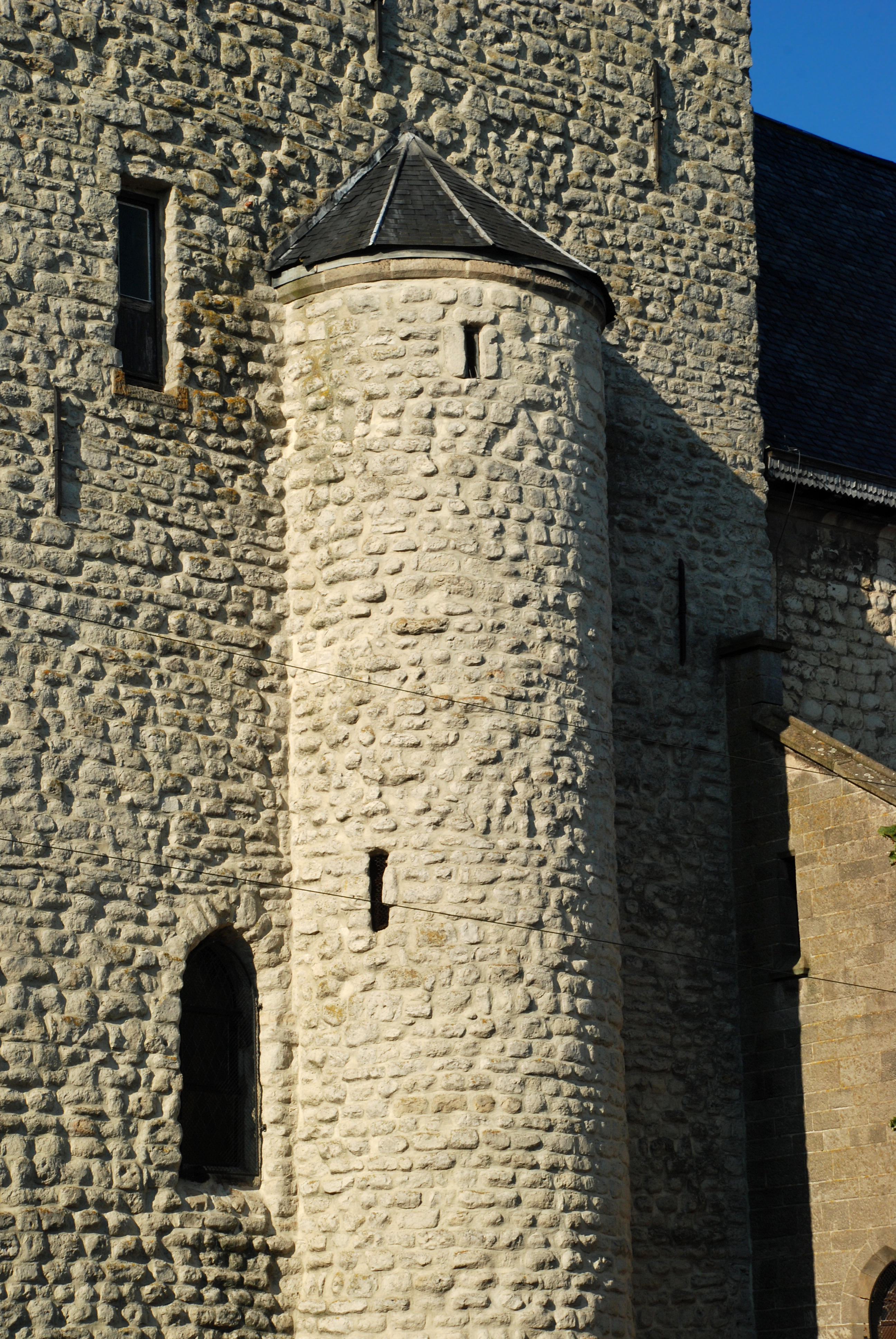 Belgique - Brabant wallon - Église Saint-Nicolas de La Hulpe